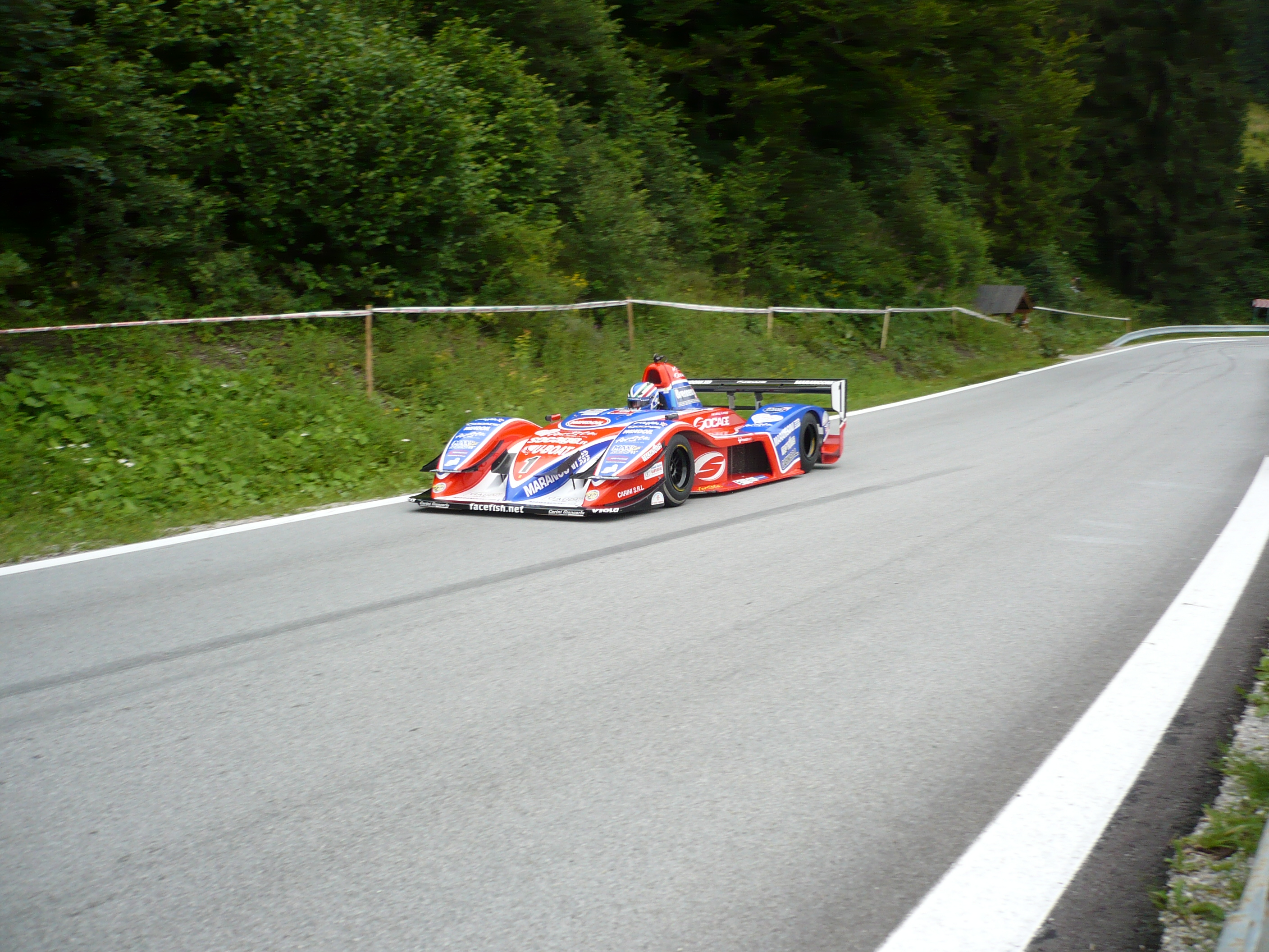 Osella FA30 Simone Faggioliho na ME PAV Dobšinský kopec 2012